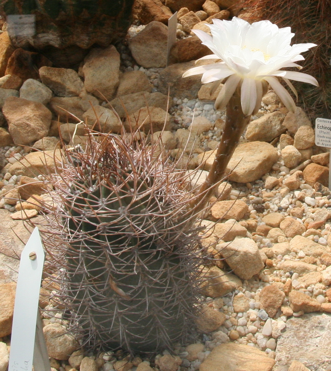 Echinopsis leucantha im Botanischen Garten Dresden